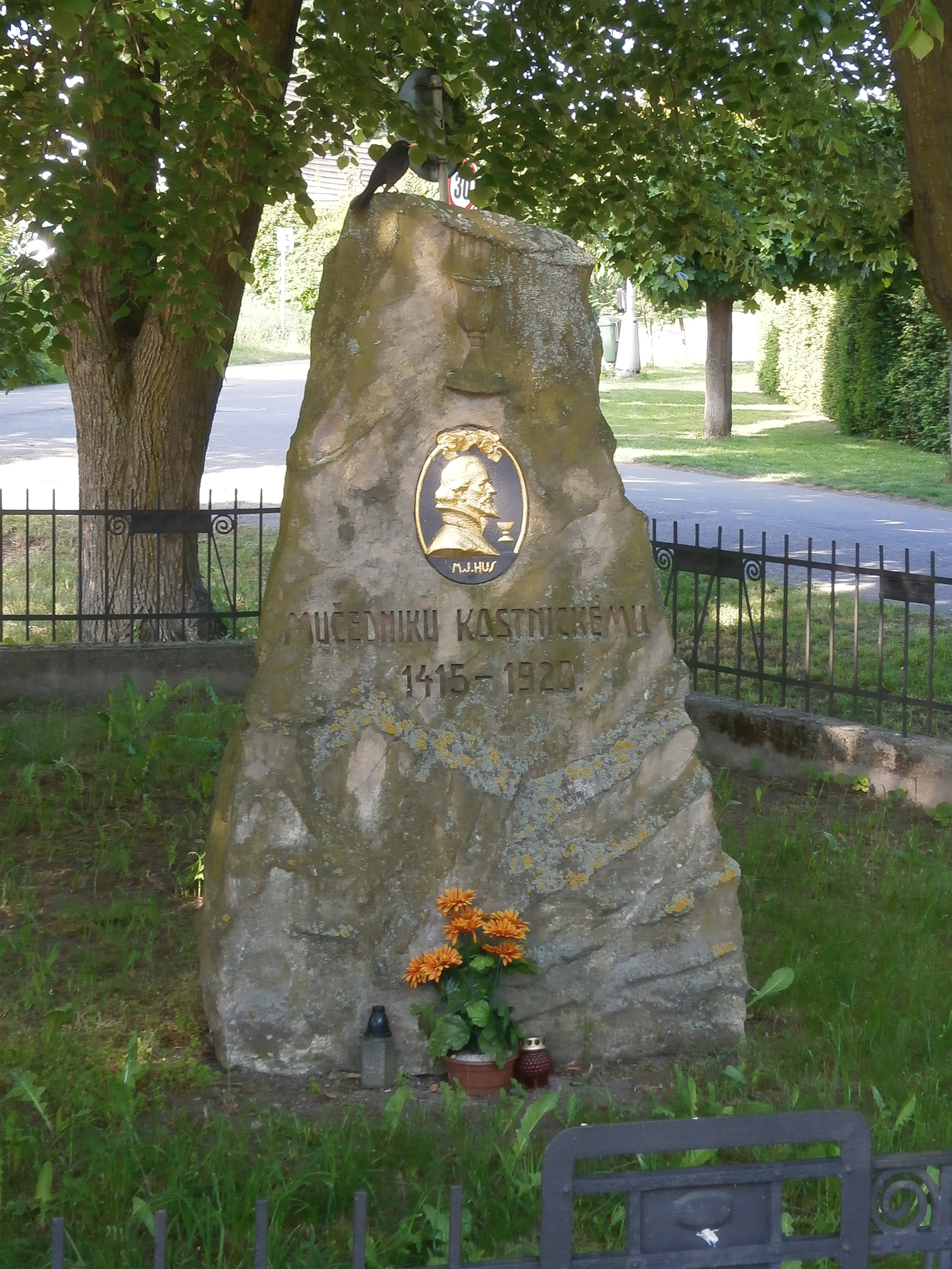 Pomník J. Husa v Třebši (Hradec Králové)